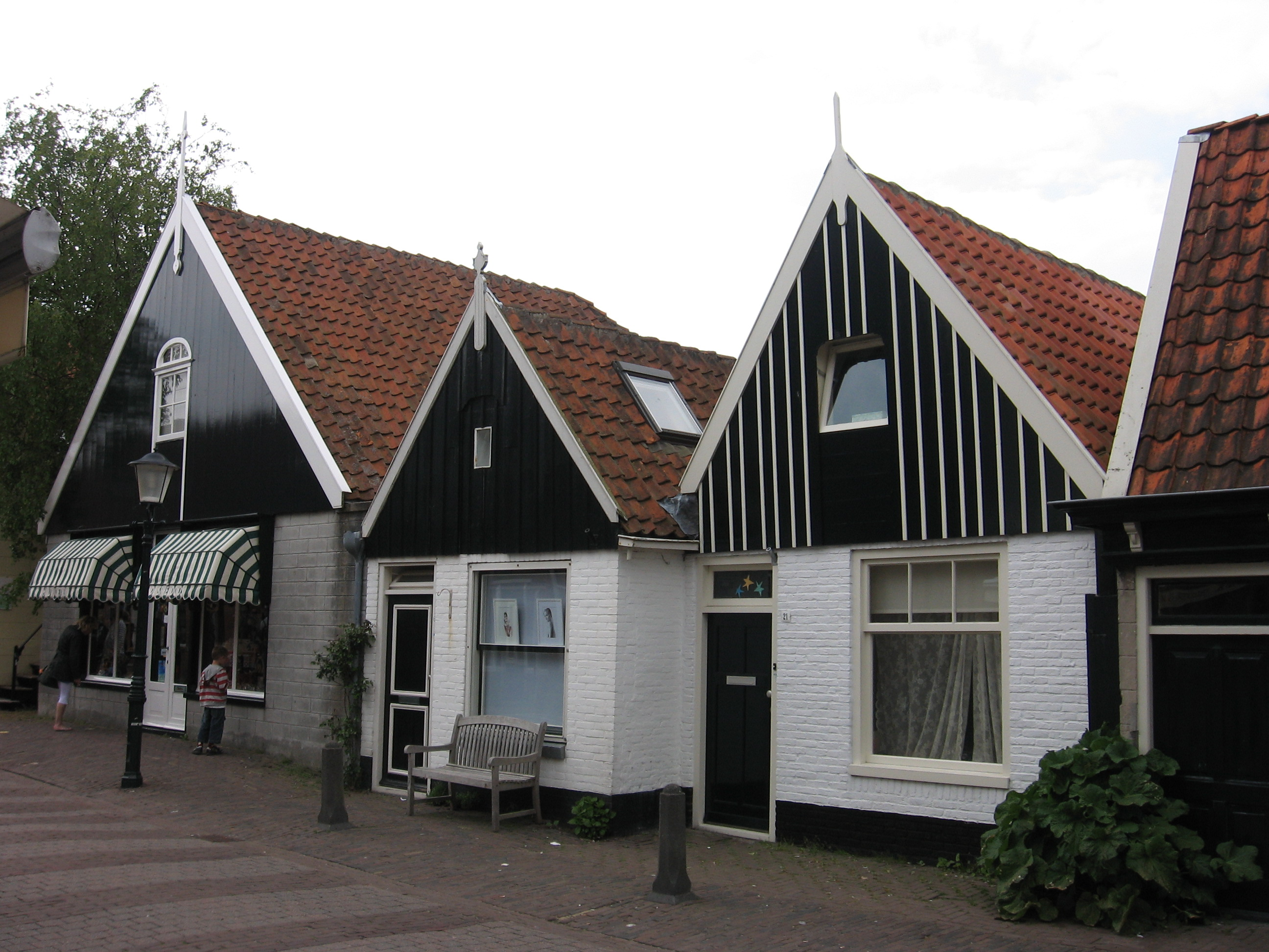 Den Burg - Waalderstraat 19-21